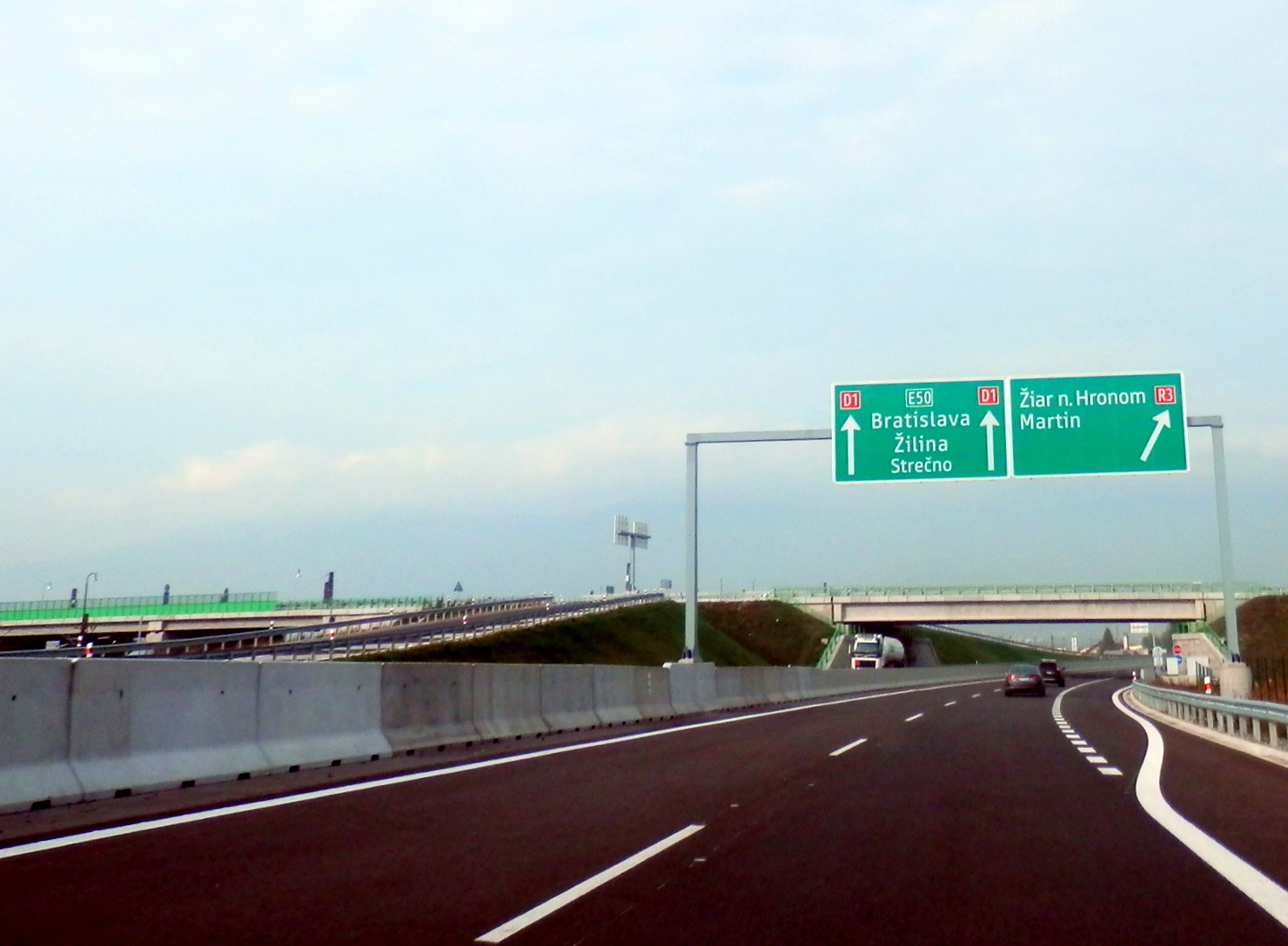 16.7.2015 bol otvorený 16 km dlhý úsek diaľnice D1 okolo Martina. Obrázok je z úseku Krpeľany – Vrútky vo smere do Žiliny.